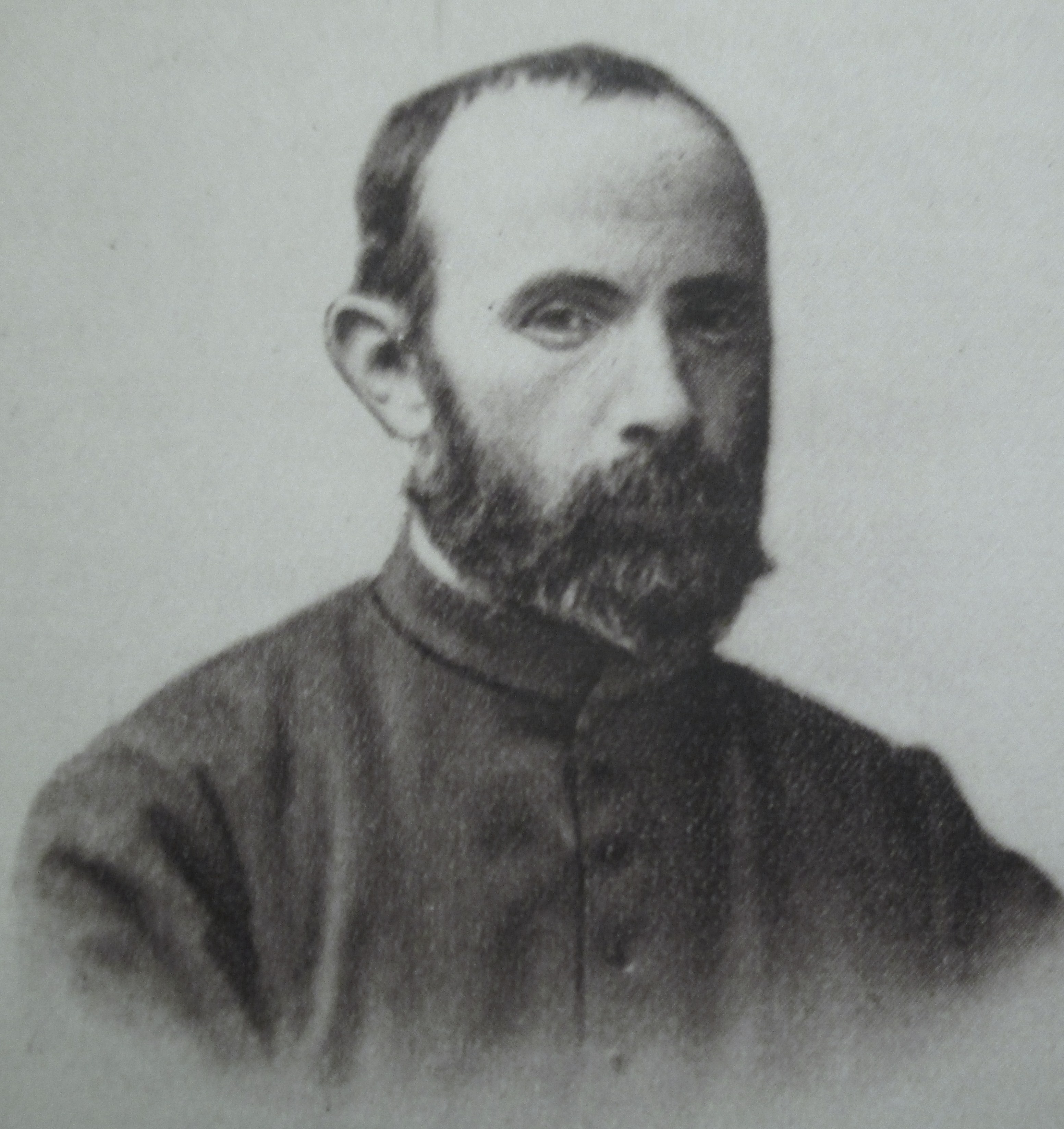 Jean-Baptiste de Guébriant, m.e.p. (né en 1860 mort en 1935) en 1901, in Mgr de Guébriant, Paris, éd. séminaire des M.E.P., 1935, p. 25